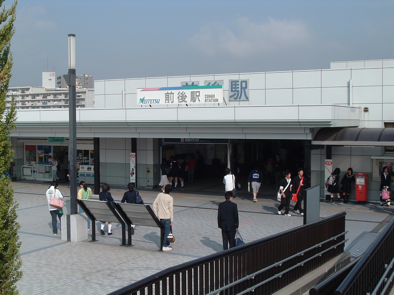 Zengo Station, Toyoake, Aichi, Japan